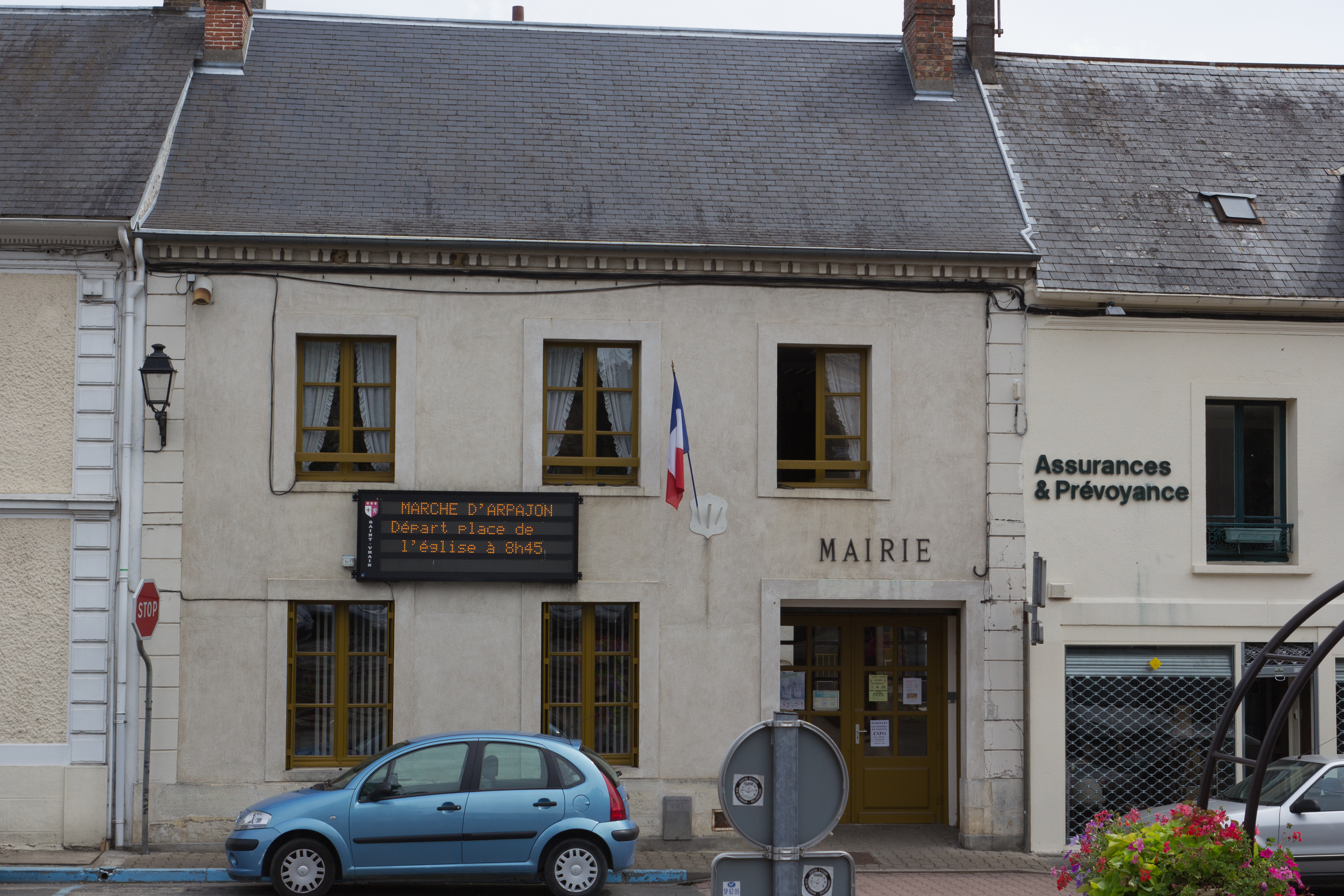 Mairie de Saint-Vrain, commune de Saint-Vrain, département de l'Essonne. France.